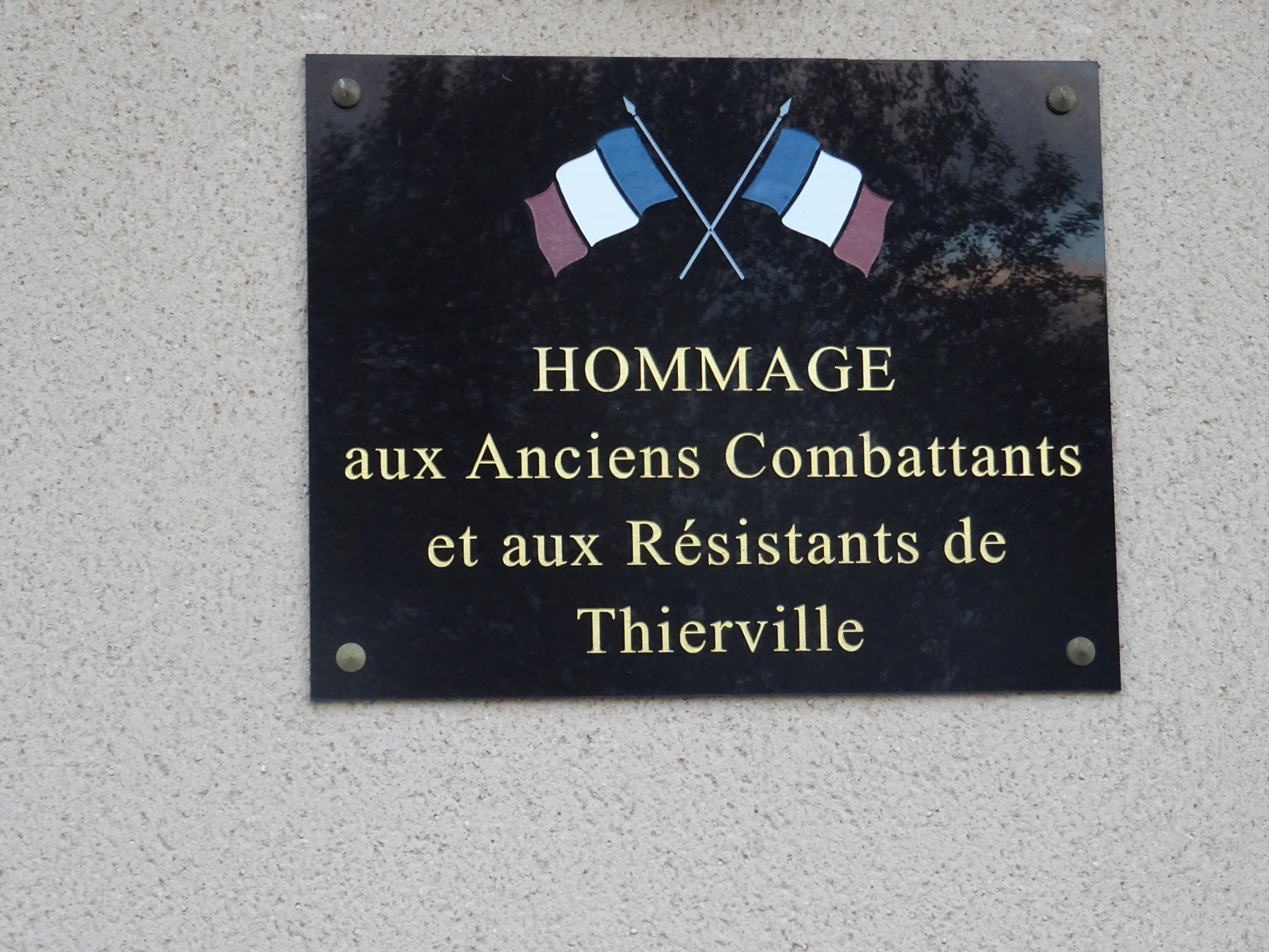 Plaque commémortive à Thierville (Eure, France), village sans monument aux morts